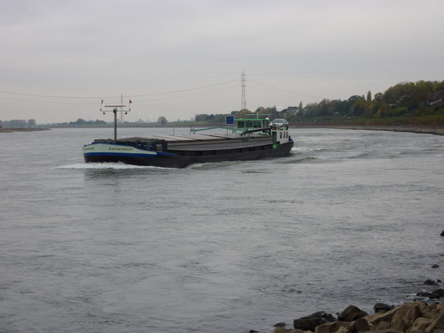 Der Rhein bei Bockum (Wittlaer, Düsseldorf), hinten 380-kV-Rhein-Freileitungskreuzung (Bl. 4123) in Duisburg